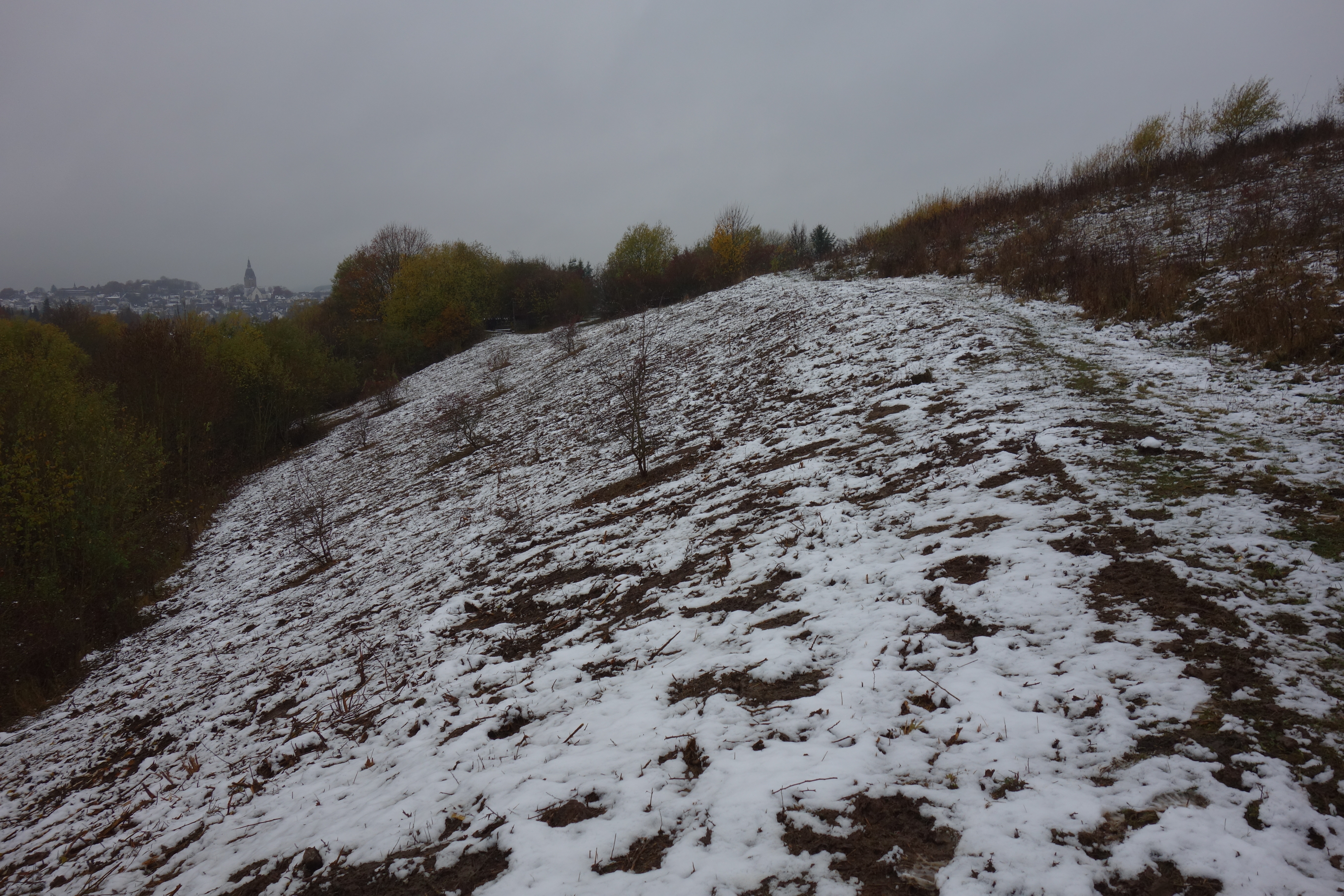 Naturschutzgebiet Frettholz; Blick auf gemulchte Fläche im Westteil des NSG auf ehemaliger Verkippung von Steinbruch; im Bildhintergrund links ist Brilon zu sehen.